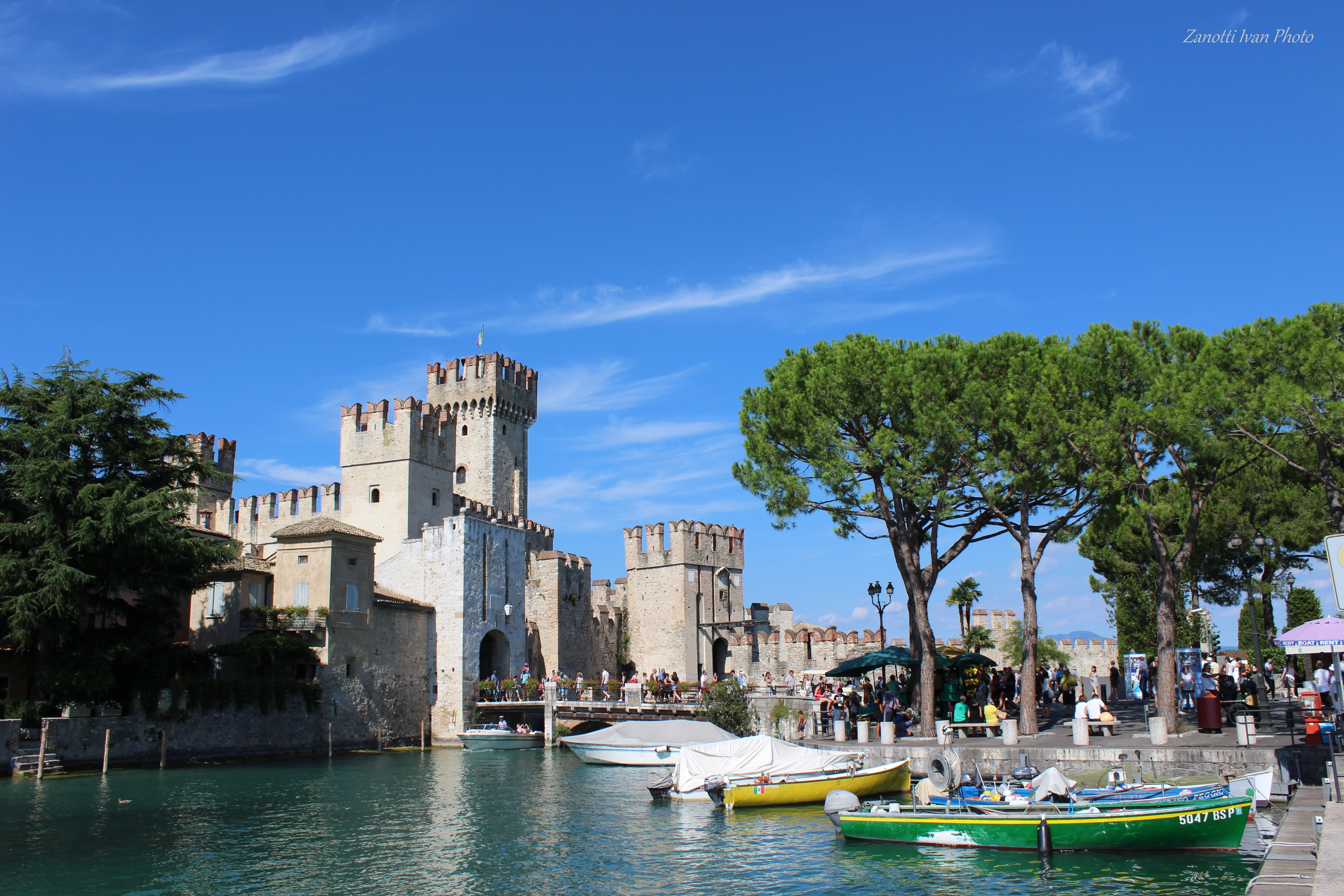 Castello Scaligero (Sirmione) This is a photo of a monument which is part of cultural heritage of Italy.